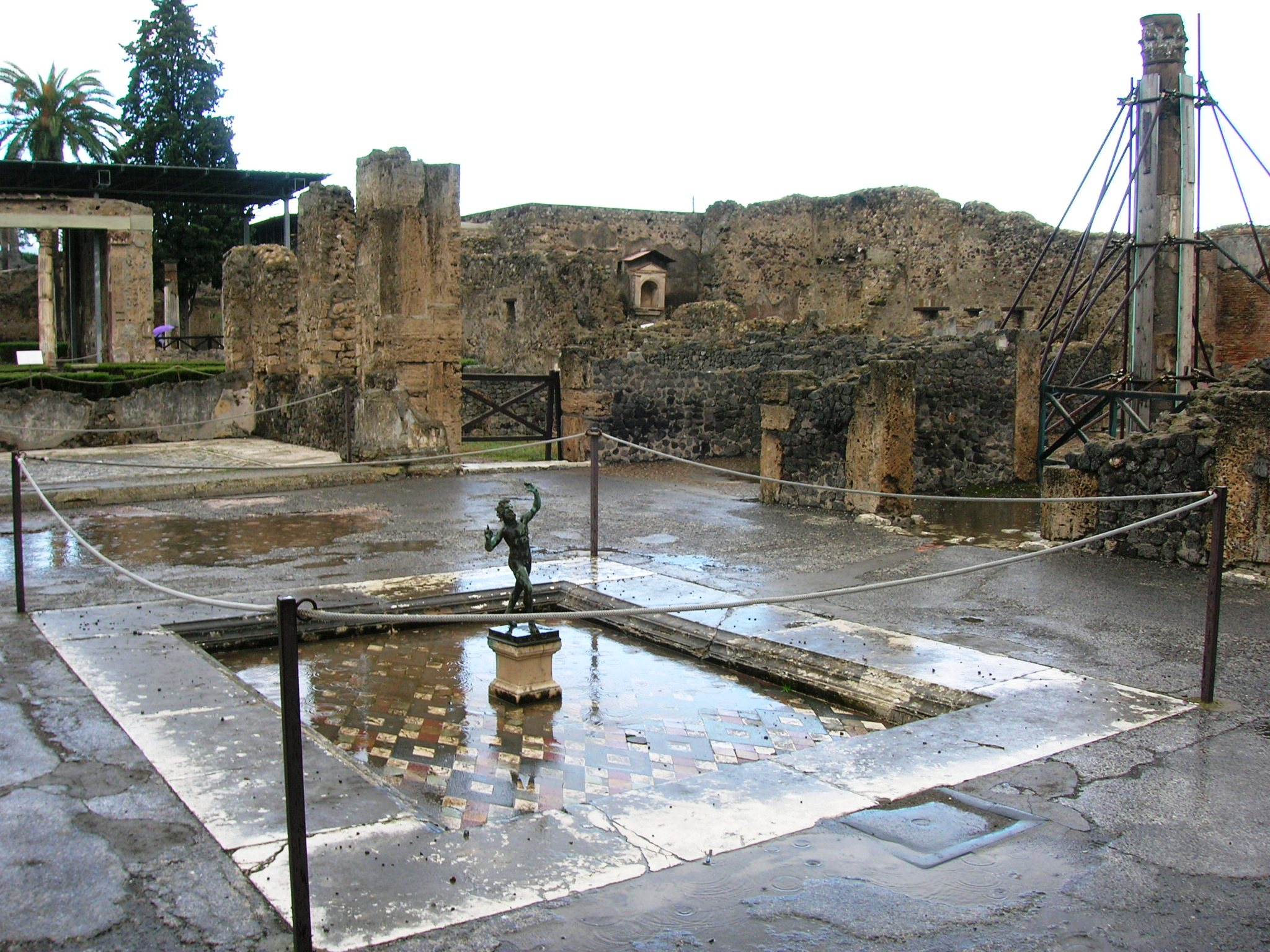 La casa del Fauno